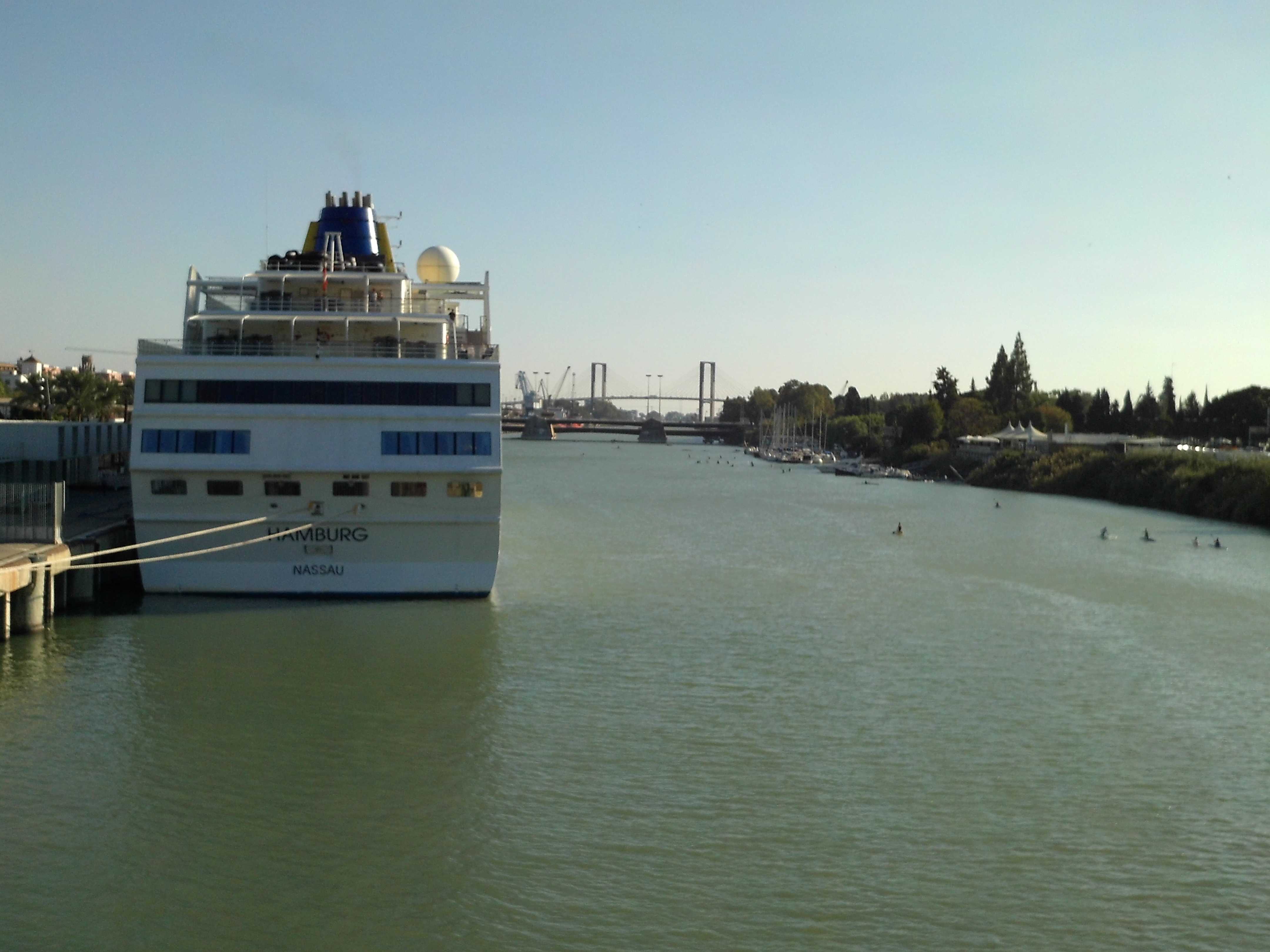 Crucero en el Guadalquivir, Sevilla, Andalucía, España.